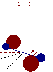 Principe de la balance de torsion (Schéma personnel)